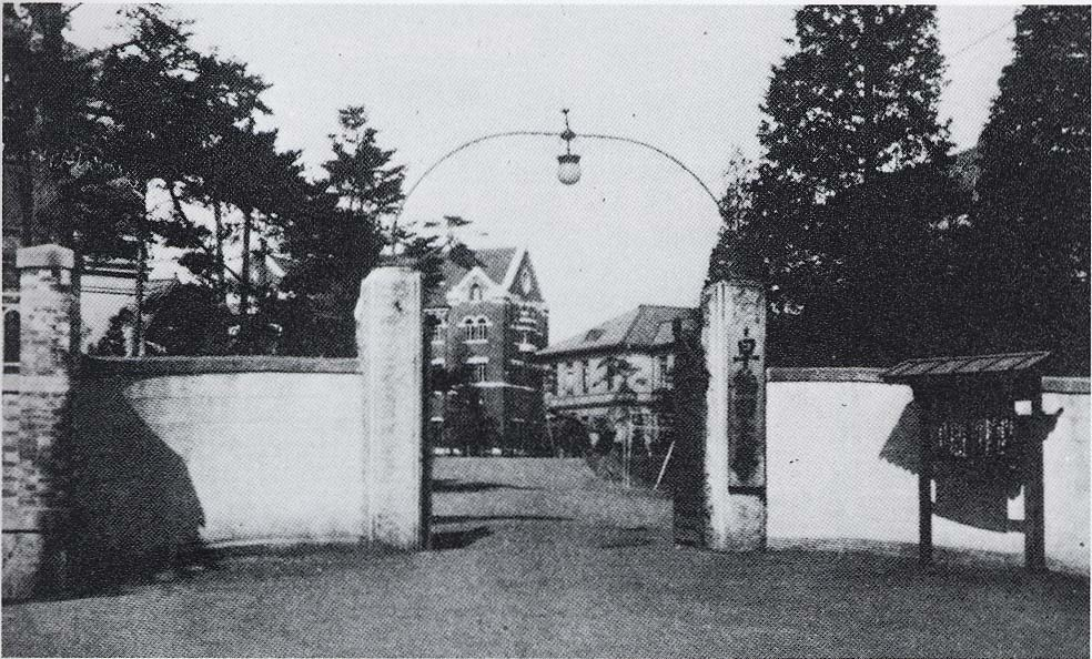 大正時代の早稲田大学（旧専門）の正門